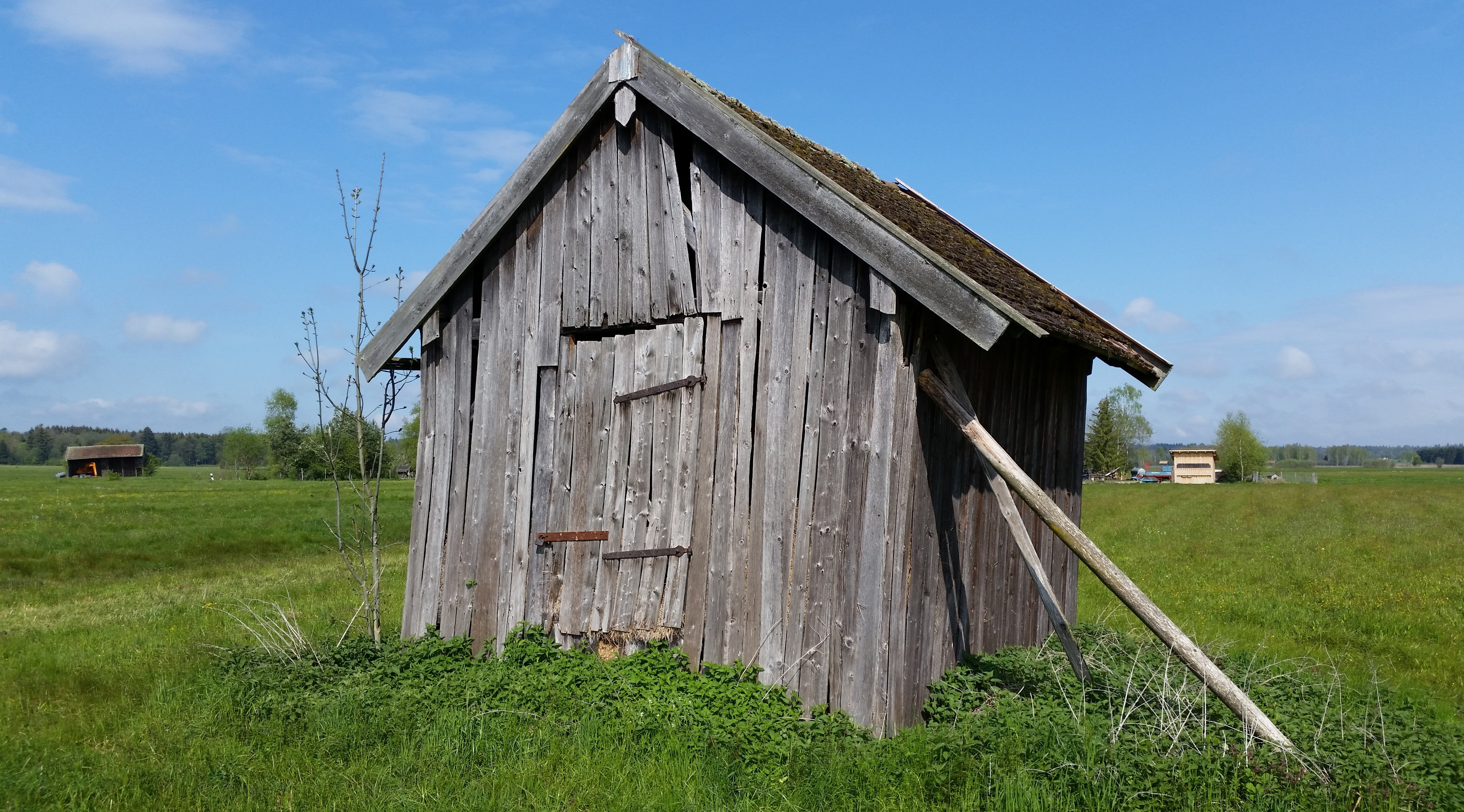 FFH-Gebiet und EU-Vogelschutzgebiet Haarmoos (8043-371).